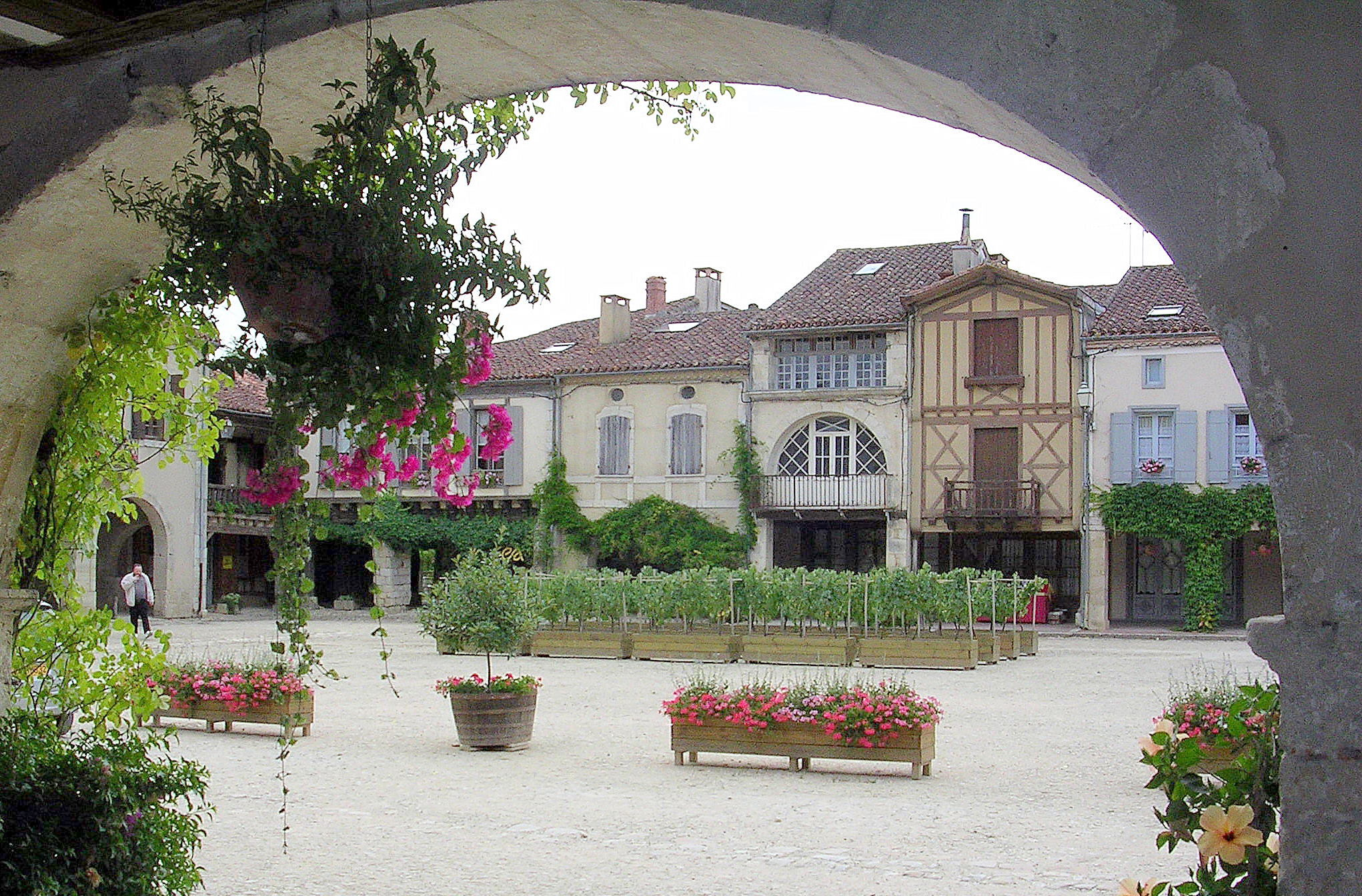 Labastide-d'Armagnac (Landes, France)